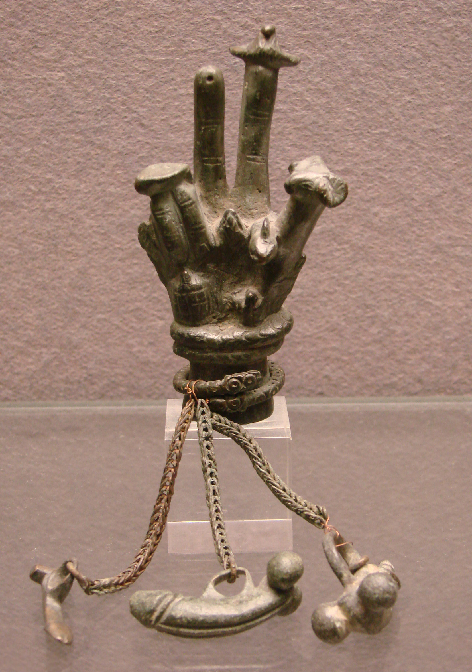 Main de bronze dédiée à Jupiter Sabazios, indiquant le développement de cultes orientaux dans l'empire romain. IIIème s. + JC.Musée de Picardie à Amiens.